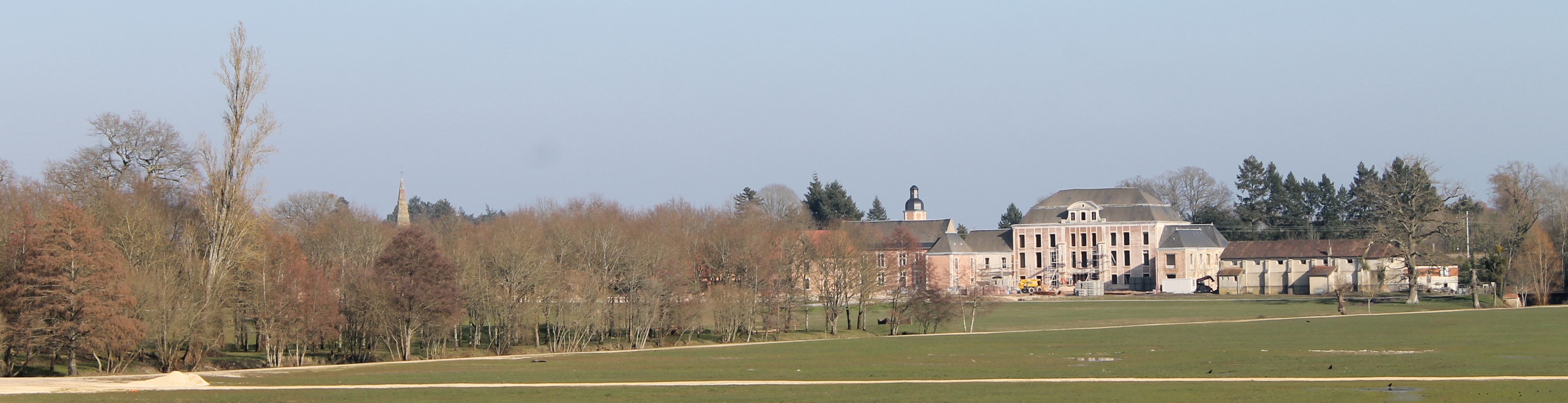 Le clocher de l'église, le château de Saint-Maurice et le Parc Equestre Fédéral.